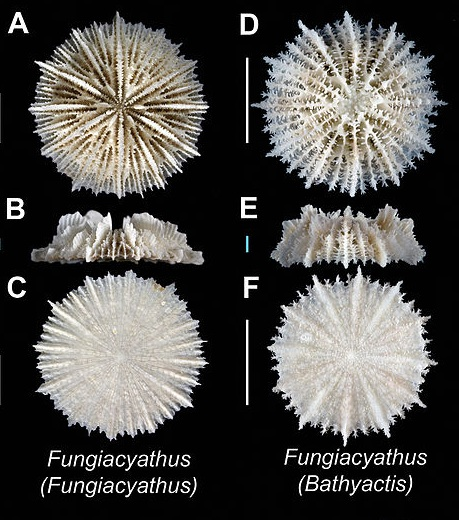 Recorte de imagen ZooKeys-227-001-g020 jpeg de Commons